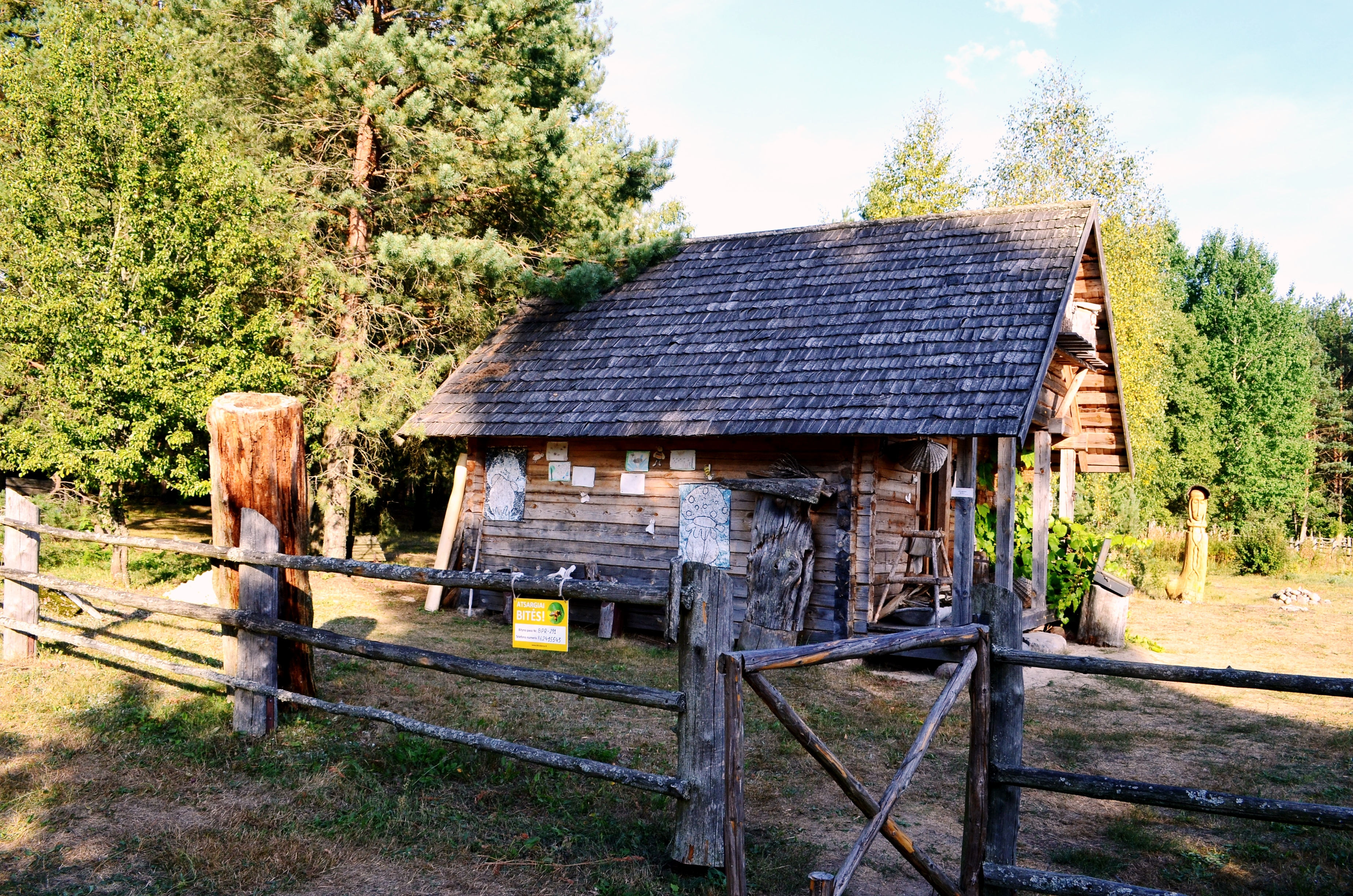 Musteikos bitininkystės muziejus, Varėnos r.